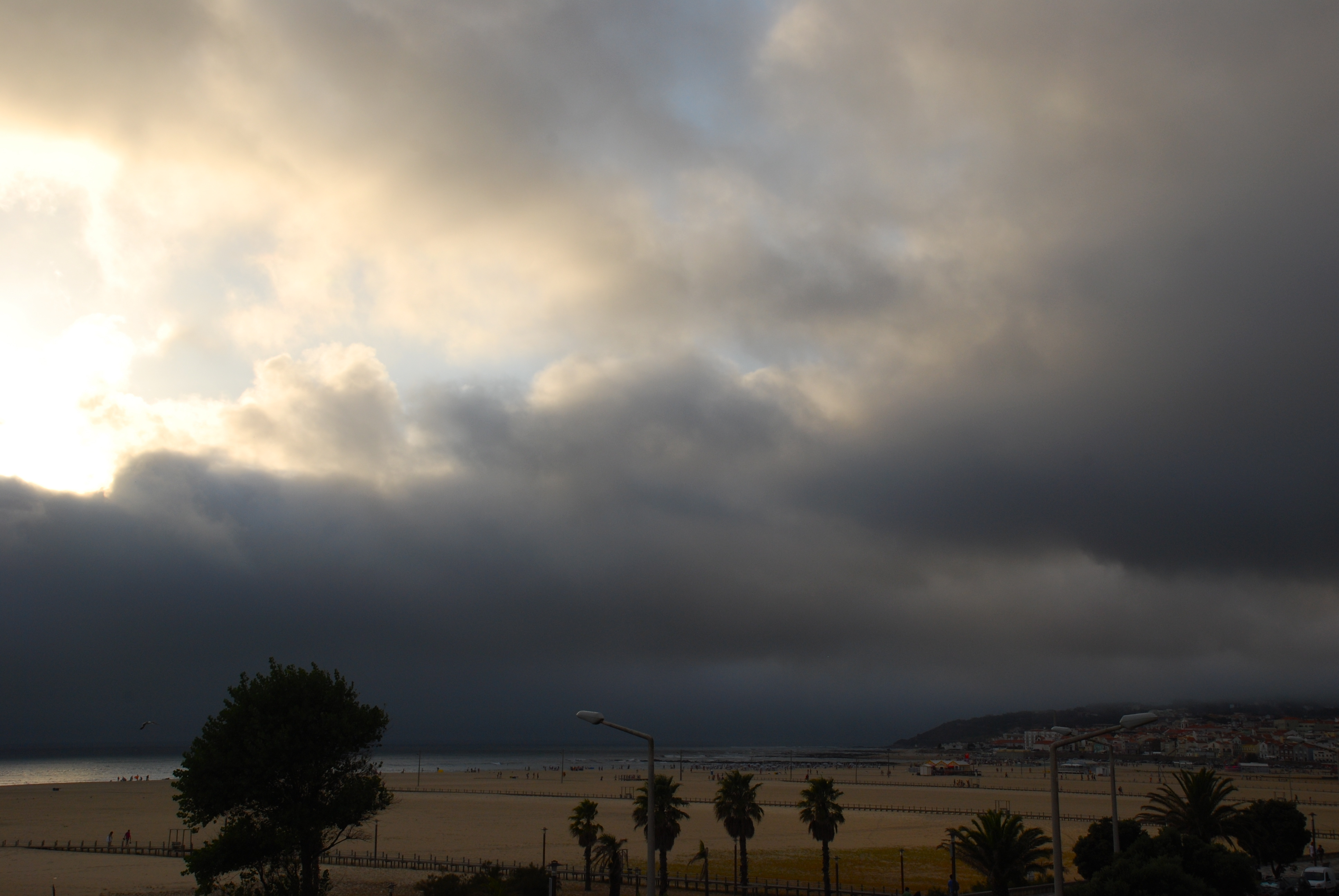 Praia de Buarcos